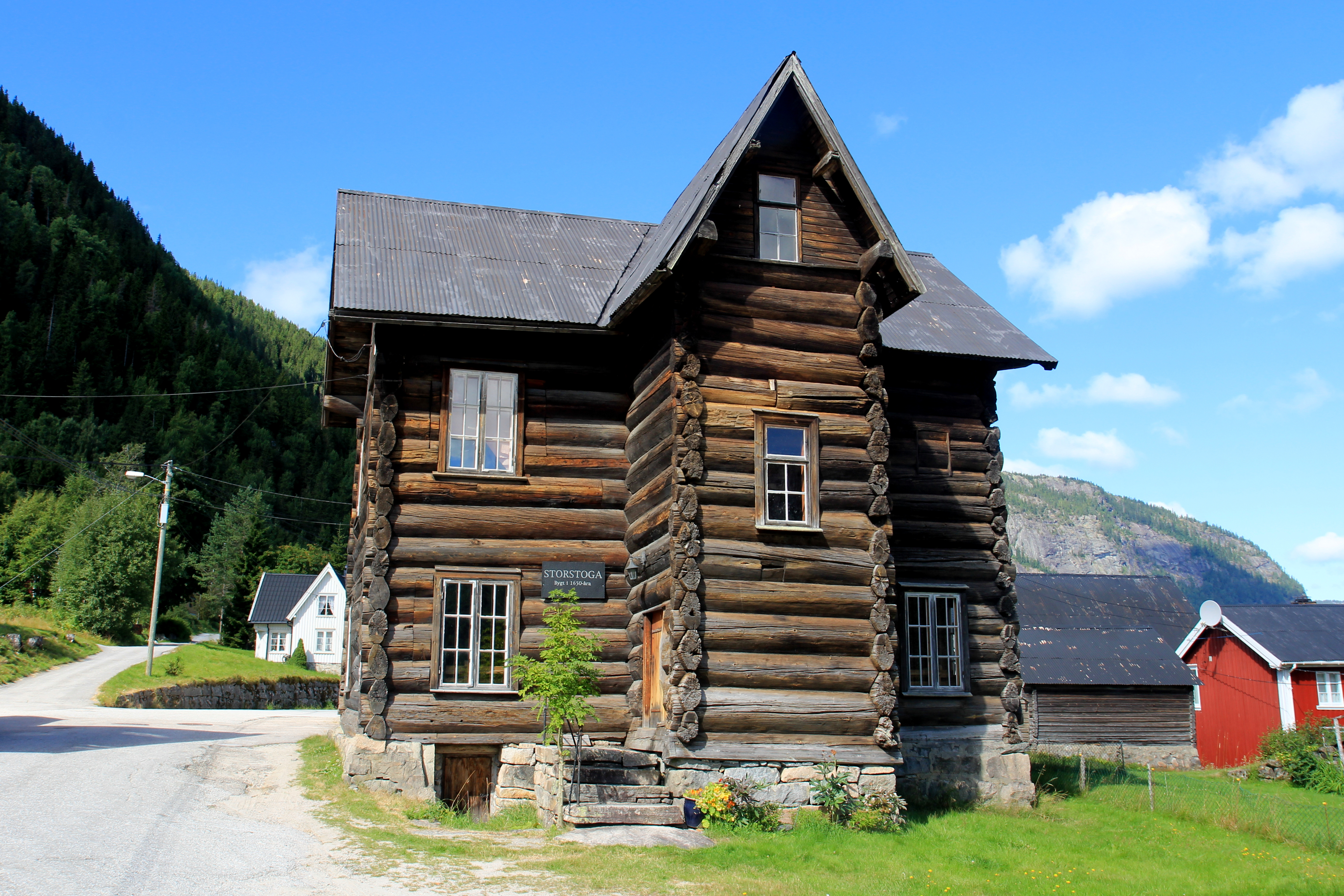 Storstoga Ose, gnr 15/129